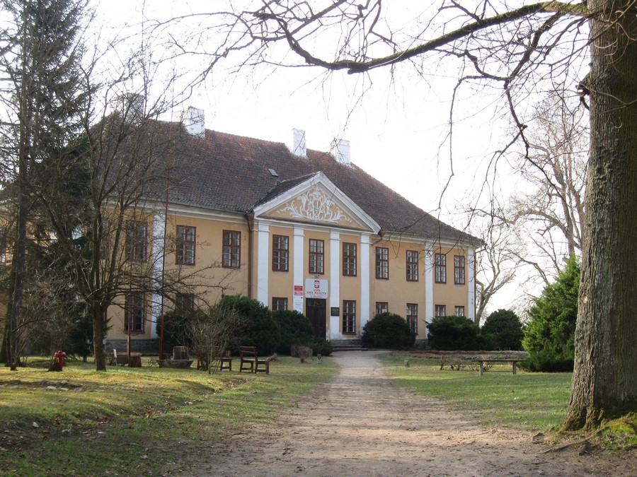 Pałac biskupów warmińskich w Smolajnach